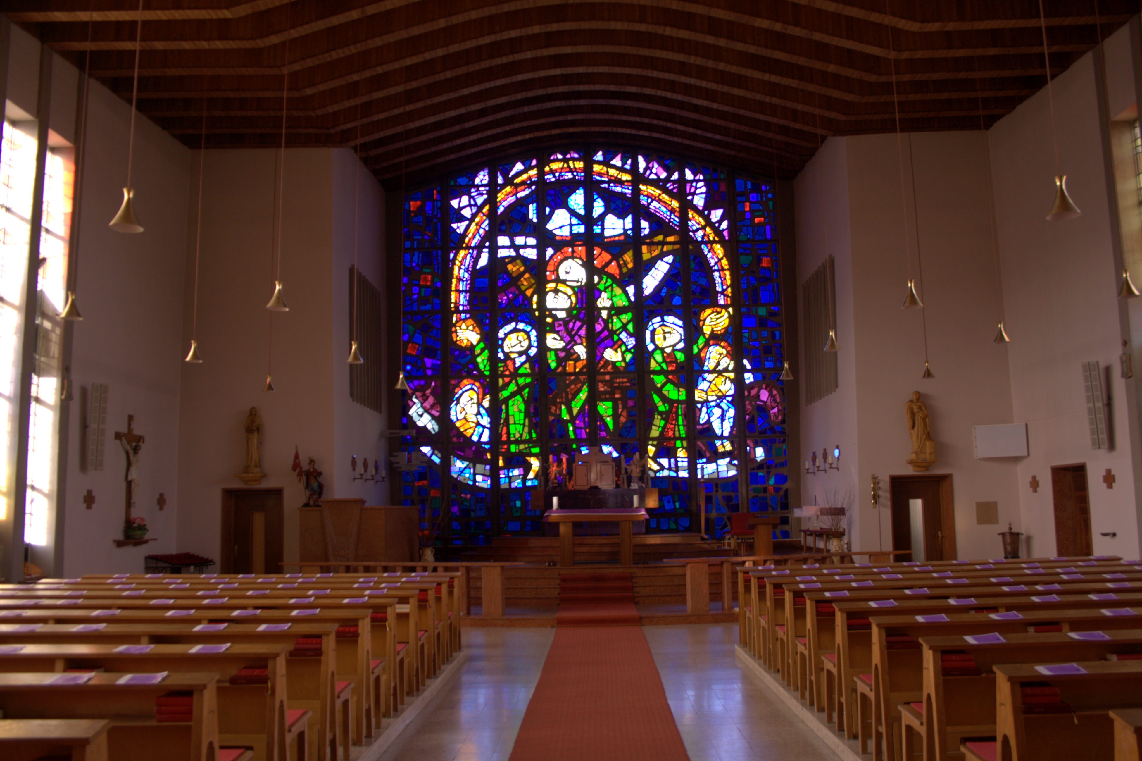 Kath. Pfarrkirche hl. Joseph der Arbeiter